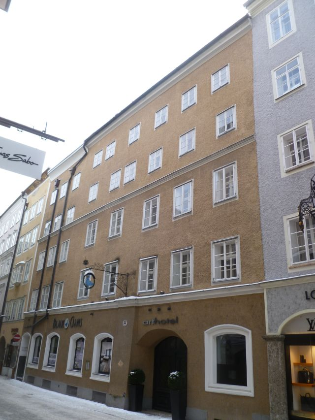 Hotel Blaue Gans, Getreidegasse 41–43, Salzburg